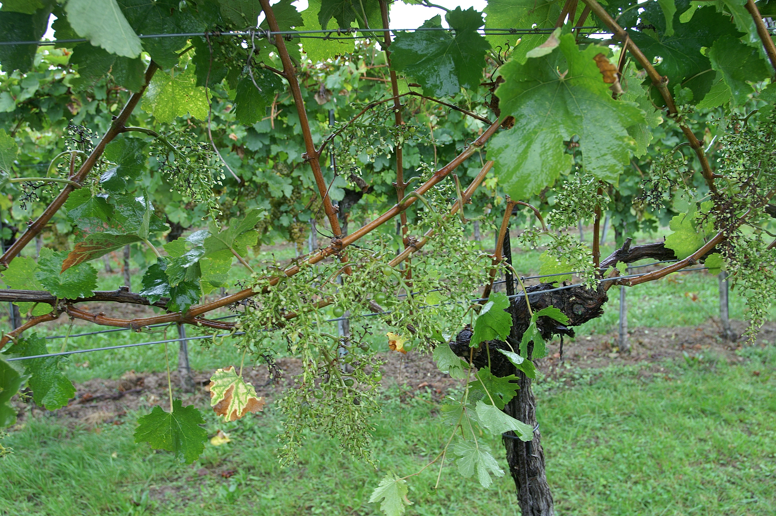 Bei der Maschinenlese verbleibt das Stielgerüst auf dem Rebstock.